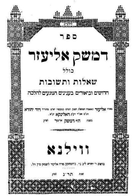 דמשק אליעזר- כריכה